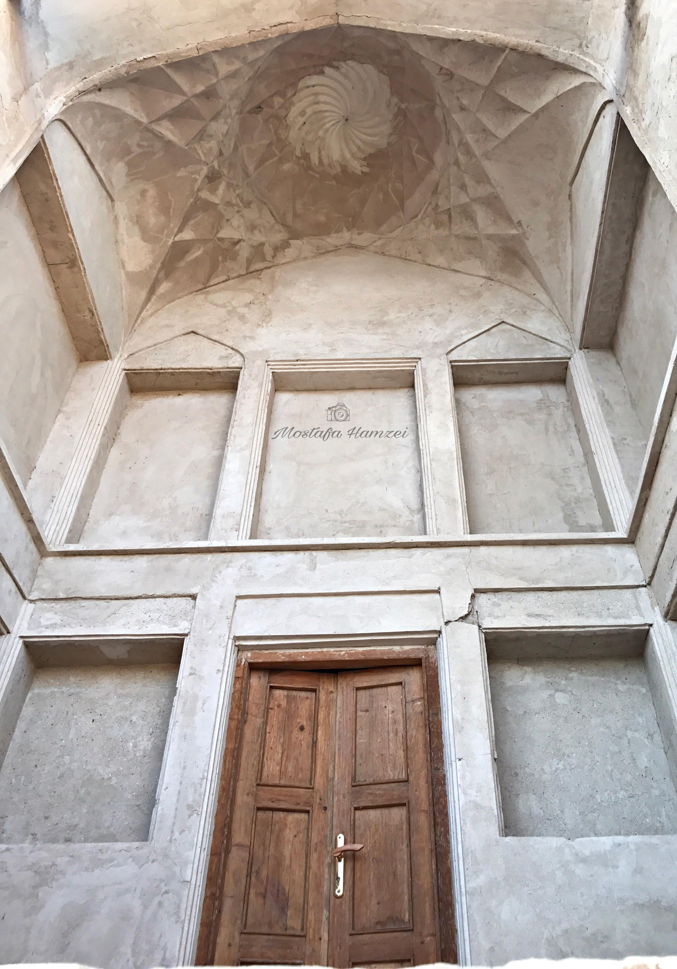 ارگ شمالی